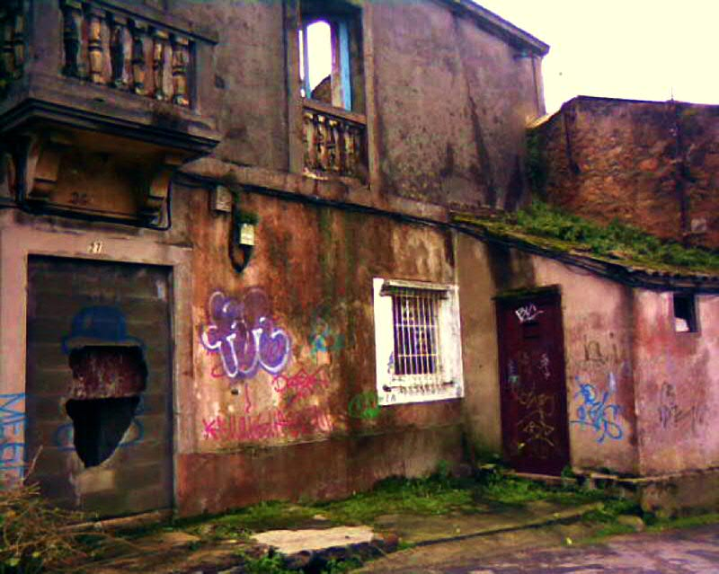 Casa do antigo concello de Oza, Esta casa sitúase na Rúa Montes (rúa que vai ao IES de Monelos e maila Igrexa de Oza) que hoxe é o límitede do parque de Oza de recente inauguración. Cando o Concello de Oza quedou totalmente esganado pola Facenda Pública e mailos impostos sanguinolentos da Deputación coruñesa que non o deixaron subsistir para que de xeito estudado fora absorbido polo concello da Coruña, que tamén estaba "enchoupado" nas débedas curiosamente, máis facilitáronselle as cousas dende a banca coruñesa (que comezaba a escalar grandes cotas de poder neses intres na cidade) entre outras... Pois ben, así as cousas, ás xentes que estaban á fronte da alcaldía de Oza naqueles intres non lles quedou máis remedio que vender o patrimonio que tiñan para poder pagar débedas, e nese lote estaba esta casa, que pasou a mans privadas até a actualidade, patrimonio polo tanto que non debería deixarse perder por máis tempo no gran saco do esquecemento, por esa razón aproveitamos calquera ocasión para sacala do armario do recordo para ver se alguén quere botarlle unha man, se queres xa che comentarei algunha outra cousa polo camiño, OK? Esta foi unha delas, porque a casa do Concello estivo localiza en máis sitios (na rúa de Monelos foi outra, se non recordo mal)" saúde, coné